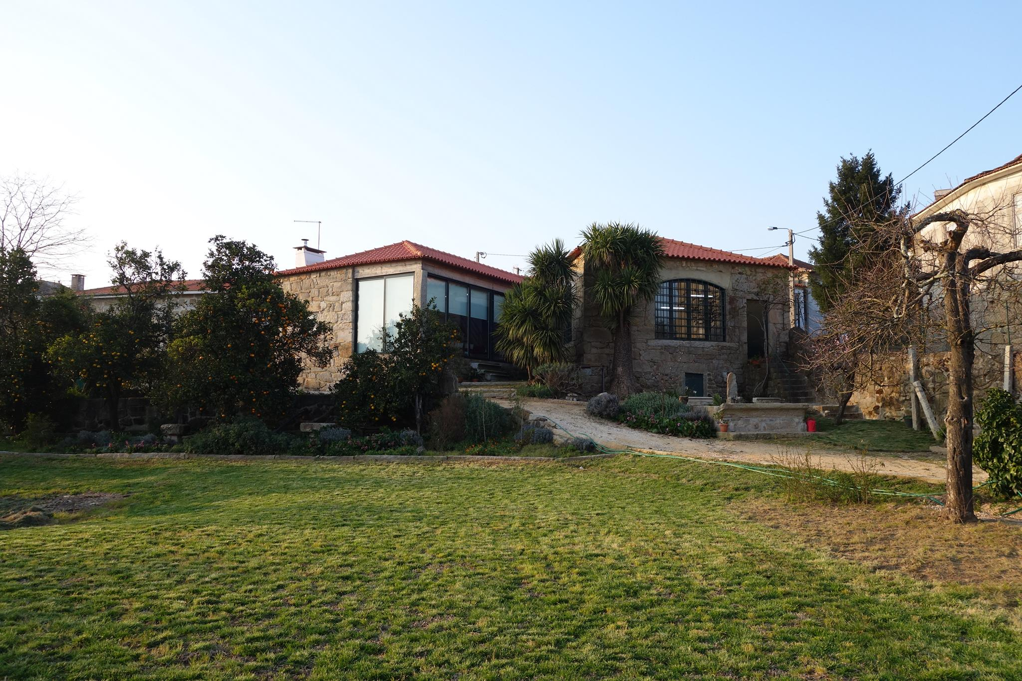 Casa São Miguel - Turismo Rural e Eventos - Gondomar: vista do exterior do salão de eventos